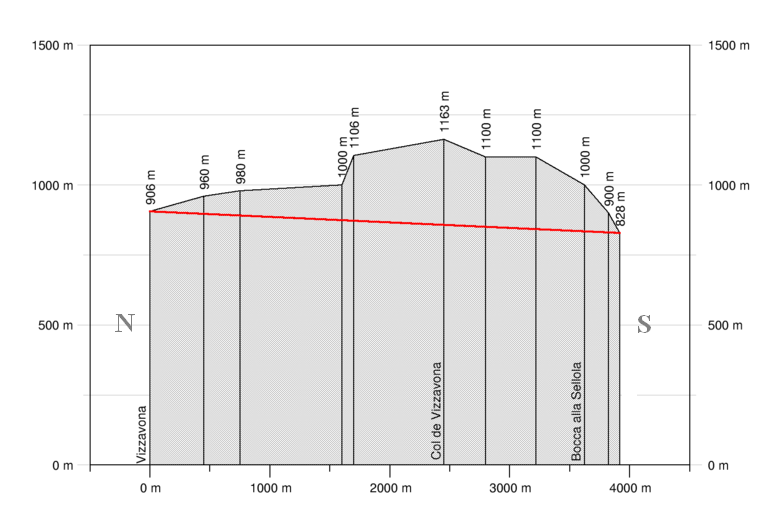 Profil du col de Vizzavona au-dessus du tunnel ferroviaire